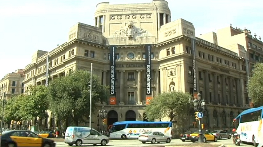 Edifici Caixa Catalunya a Barcelona amb rètols de CatalunyaCaixa